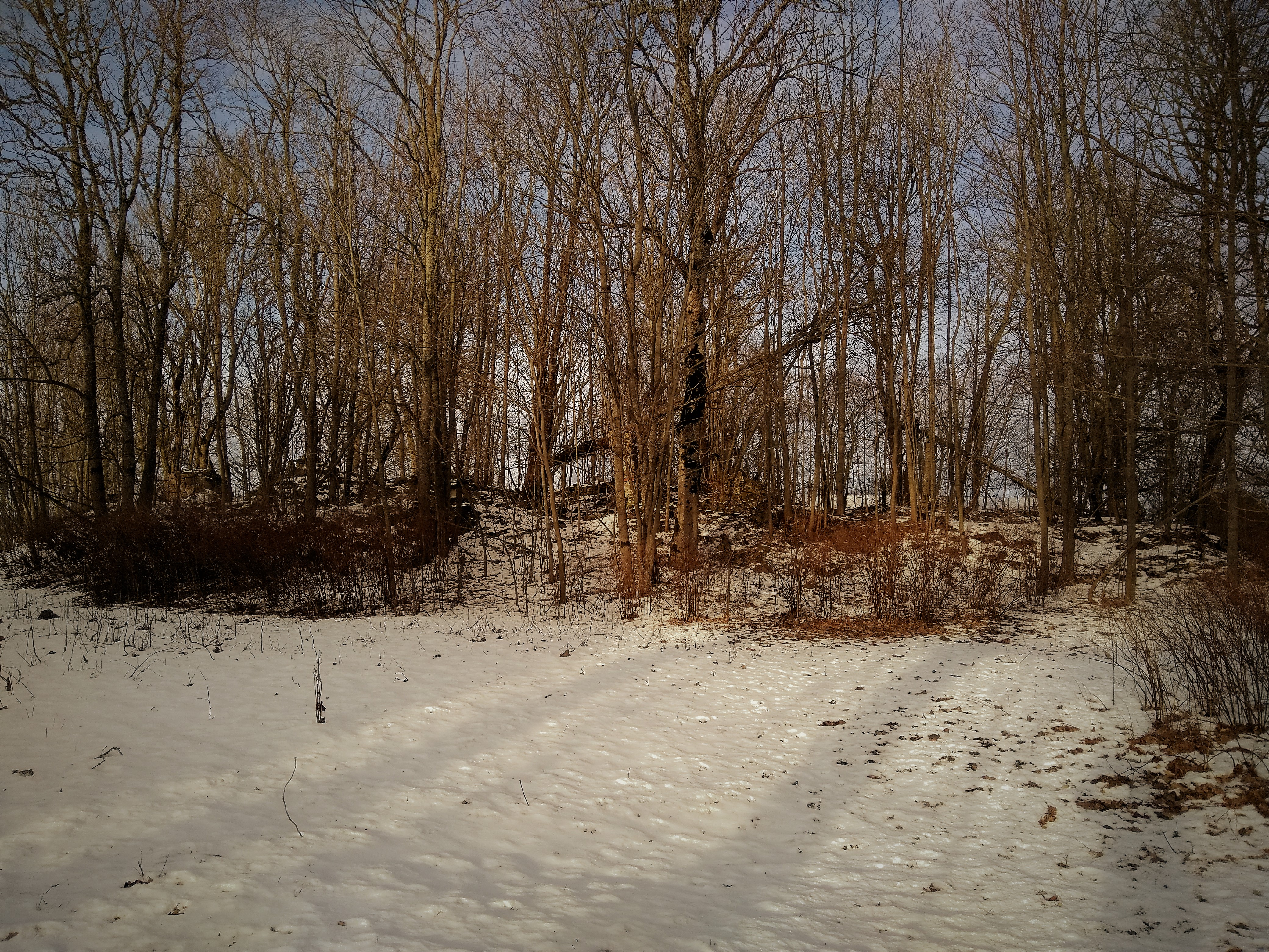 Vaade Paadremaa mõisa peahoone asukoha künkale edelast. Sookalda küla